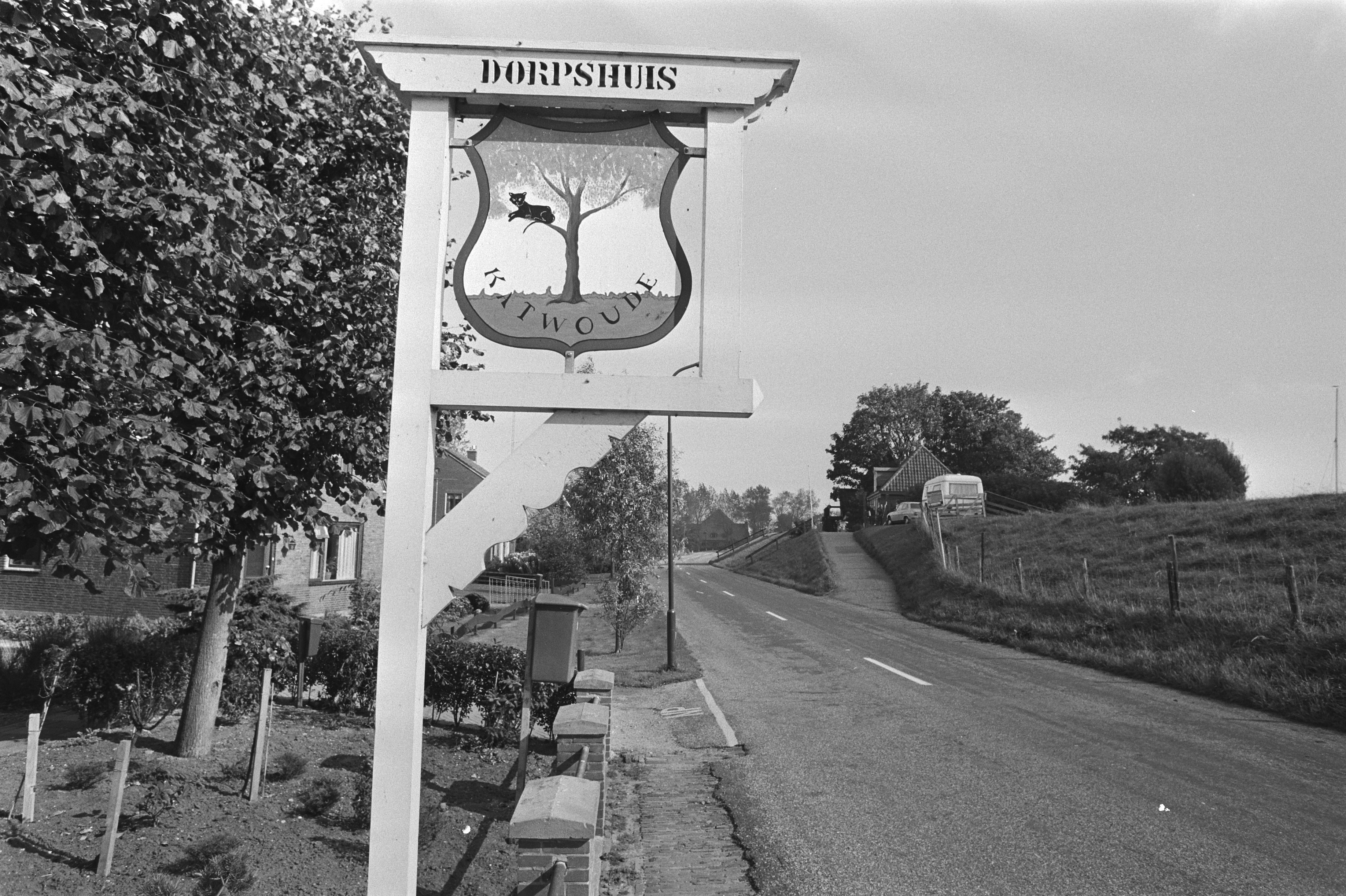 Collectie / Archief : Fotocollectie Anefo Reportage / Serie : Kleinste zelfstandige gemeente van Nederland, Katwoude (NH), met opheffing bedreigd Beschrijving : Gemeentewapen van Katwoude bij dorpshuis Datum : 28 september 1981 Locatie : Katwoude, Noord-Holland Trefwoorden : dorpshuizen, gemeentewapens Fotograaf : Croes, Rob C. / Anefo Auteursrechthebbende : Nationaal Archief Materiaalsoort : Negatief (zwart/wit) Nummer archiefinventaris : bekijk toegang 2.24.01.05 Bestanddeelnummer : 931-7089